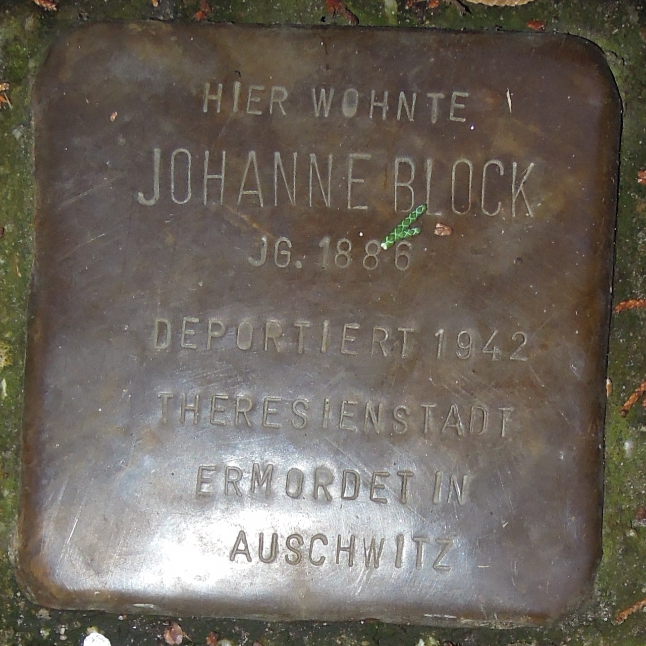 Stolpersteine in Soest Georgsgasse 4, Johanne Block